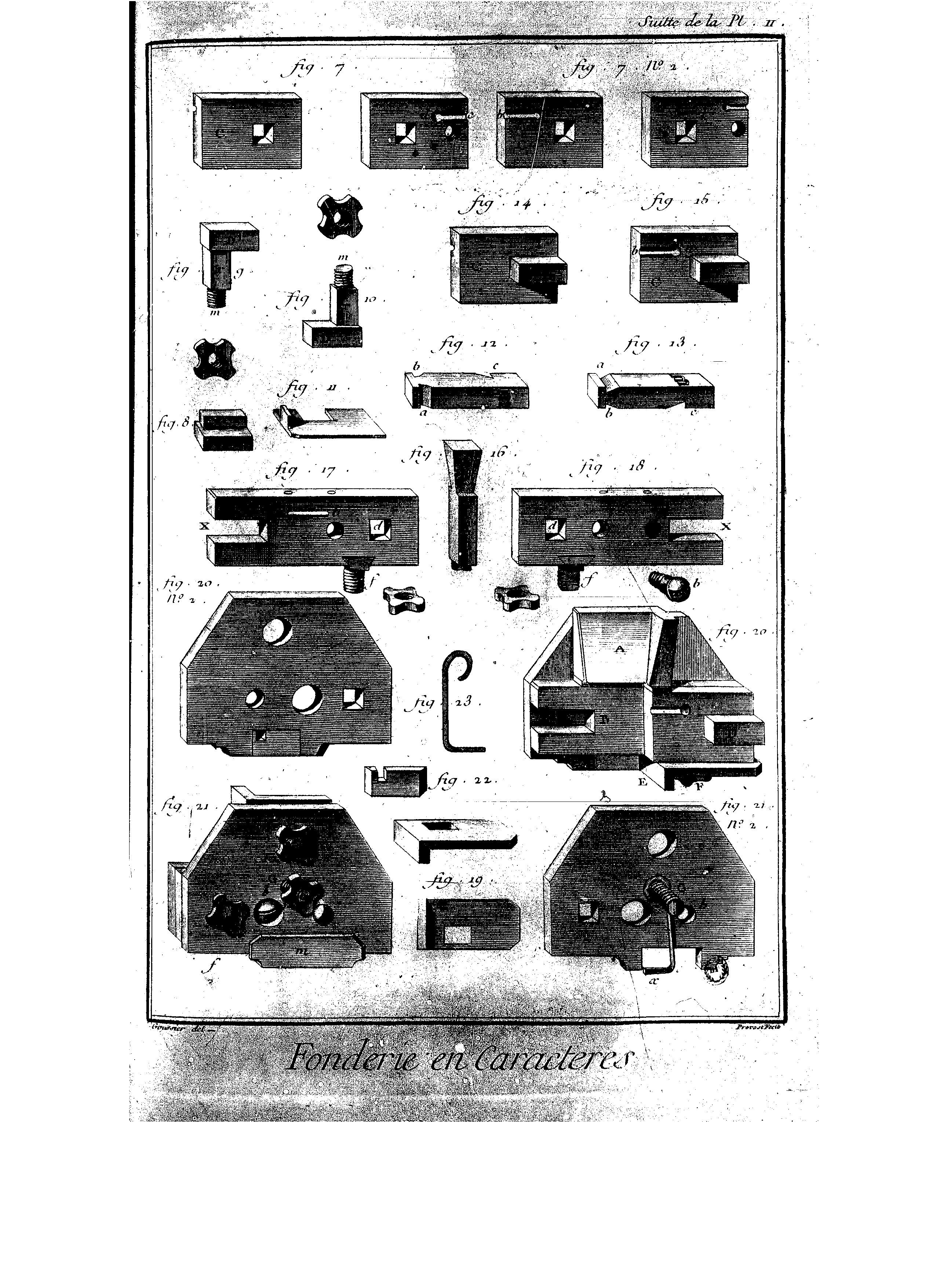 Planches de l'Encyclopédie de Diderot et d'Alembert, volume 2